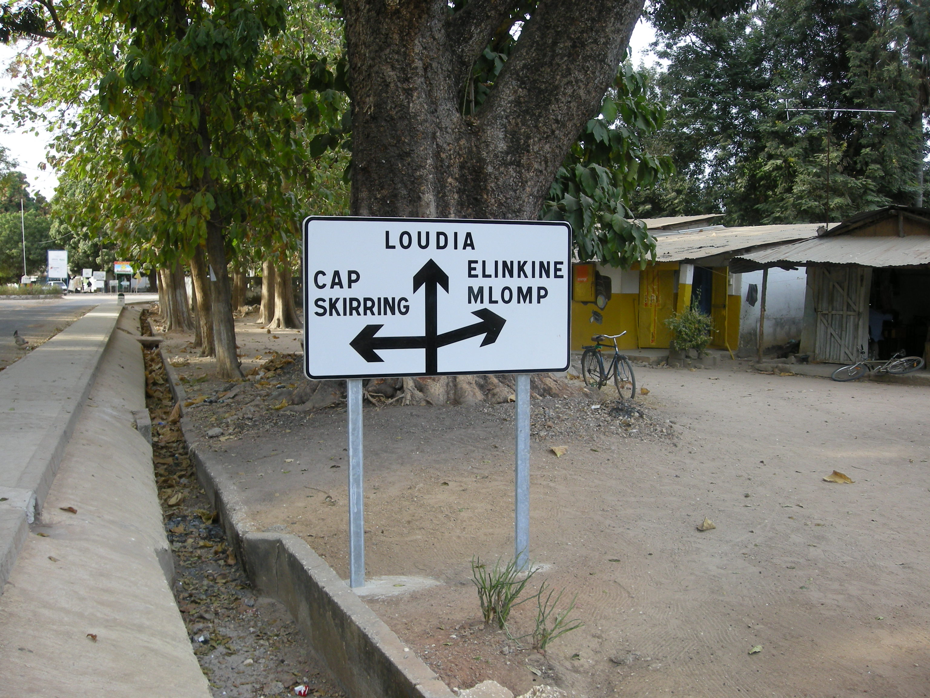 Signalisation routière à Oussouye (Casamance, Sénégal), en venant de Ziguinchor